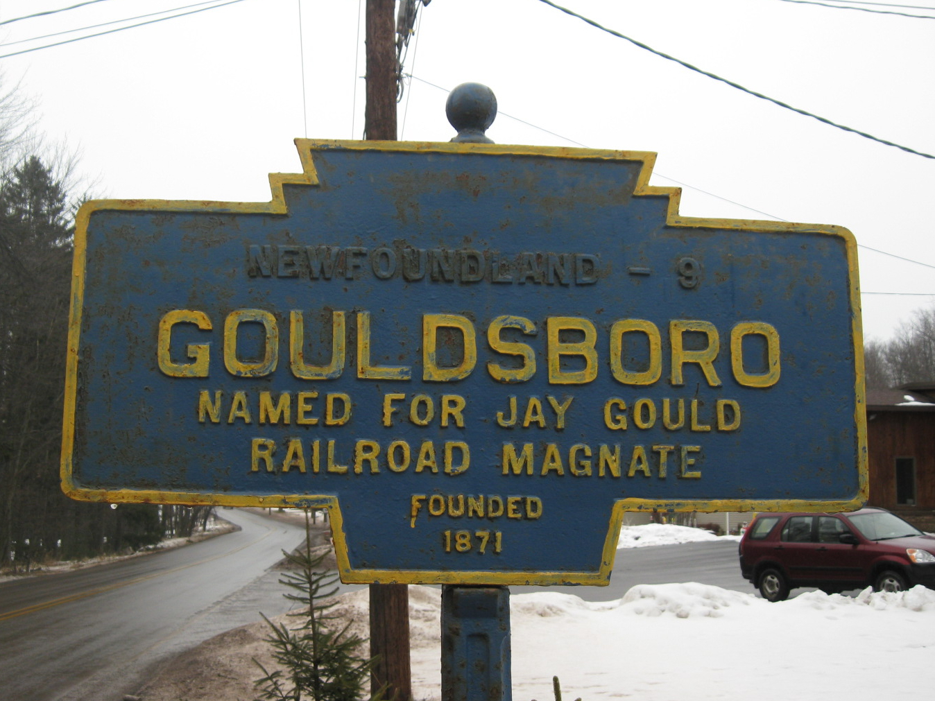 Pennsylvania Keystone Marker - Gouldsboro, PA